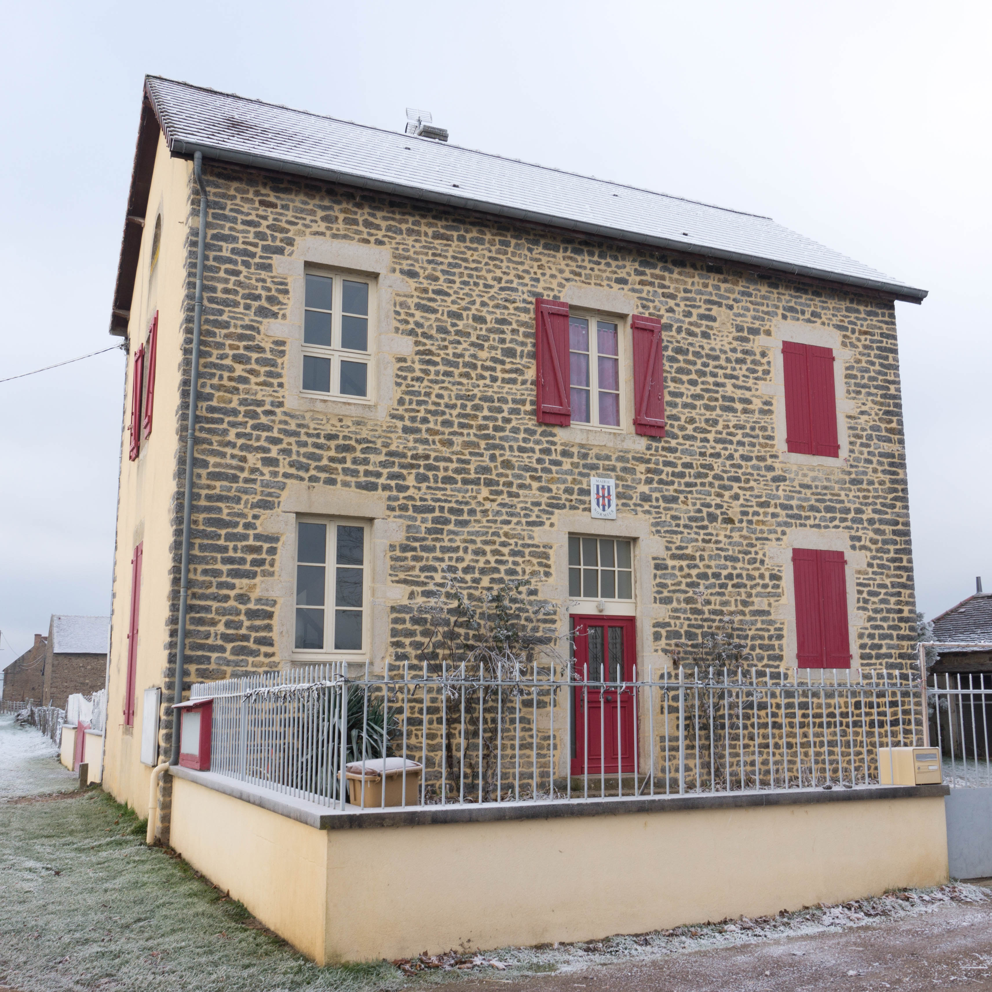 Mairie de Normier